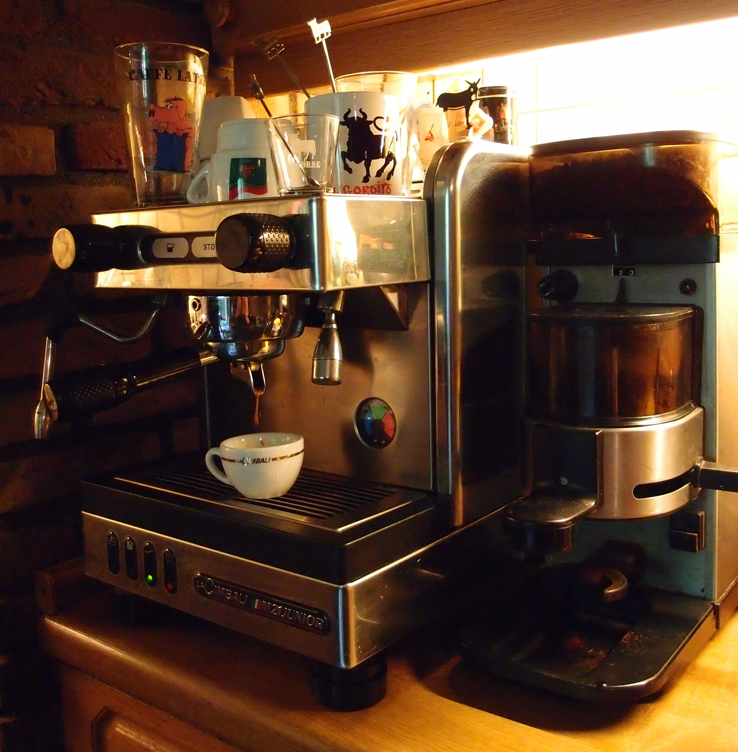 Espressomaschine La Cimbali M21 Junior mit La Cimbali Mühle (MD Junior) Datum: 19.08.2011 Urheber: M. Pfeiffer alias Benutzer:Gordito1869 Quelle: privates Fotoarchiv des Urhebers